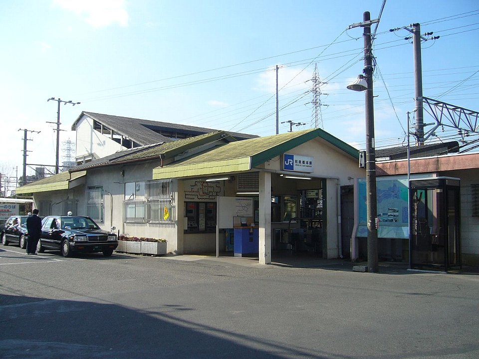 和泉橋本駅 2007年1月25日 Bakkai撮影